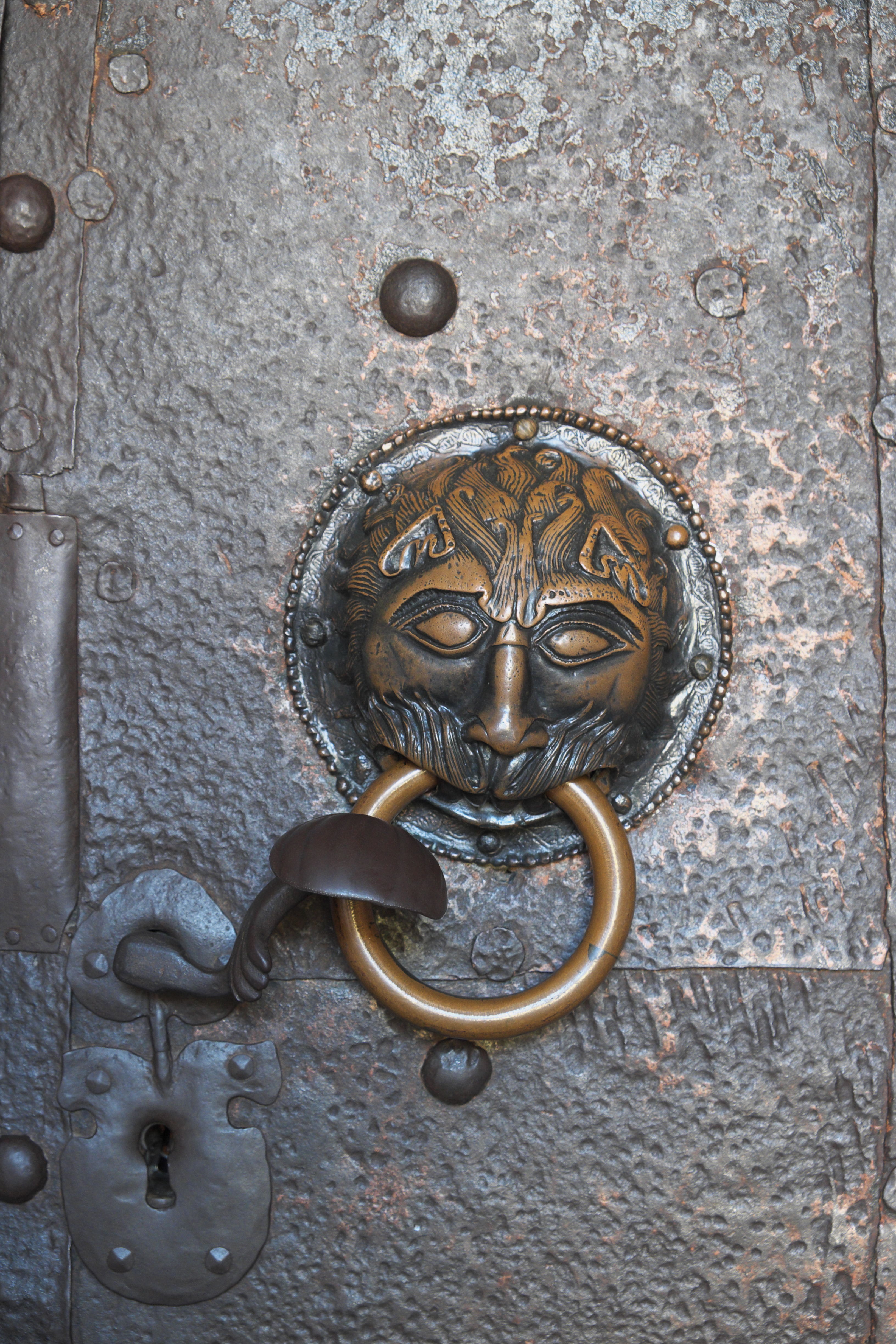 Katholische Abtei- und Kuratiekirche Mariä Opferung des Benediktinerinnenklosters Frauenchiemsee auf der Fraueninsel im Landkreis Rosenheim (Bayern/Deutschland), Portal mit Türklopfer